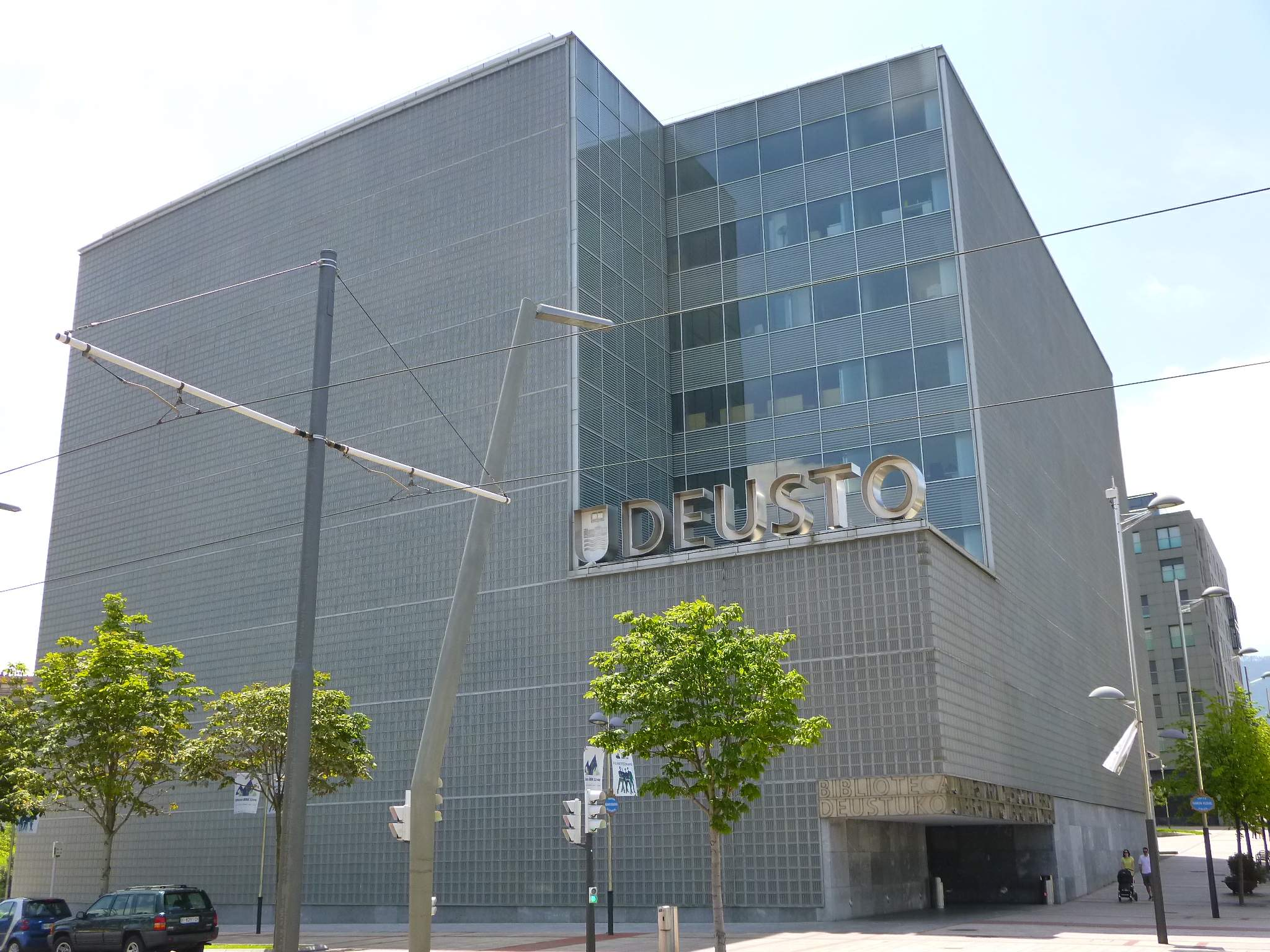 Nueva Biblioteca de la Universidad de Deusto (Bilbao)